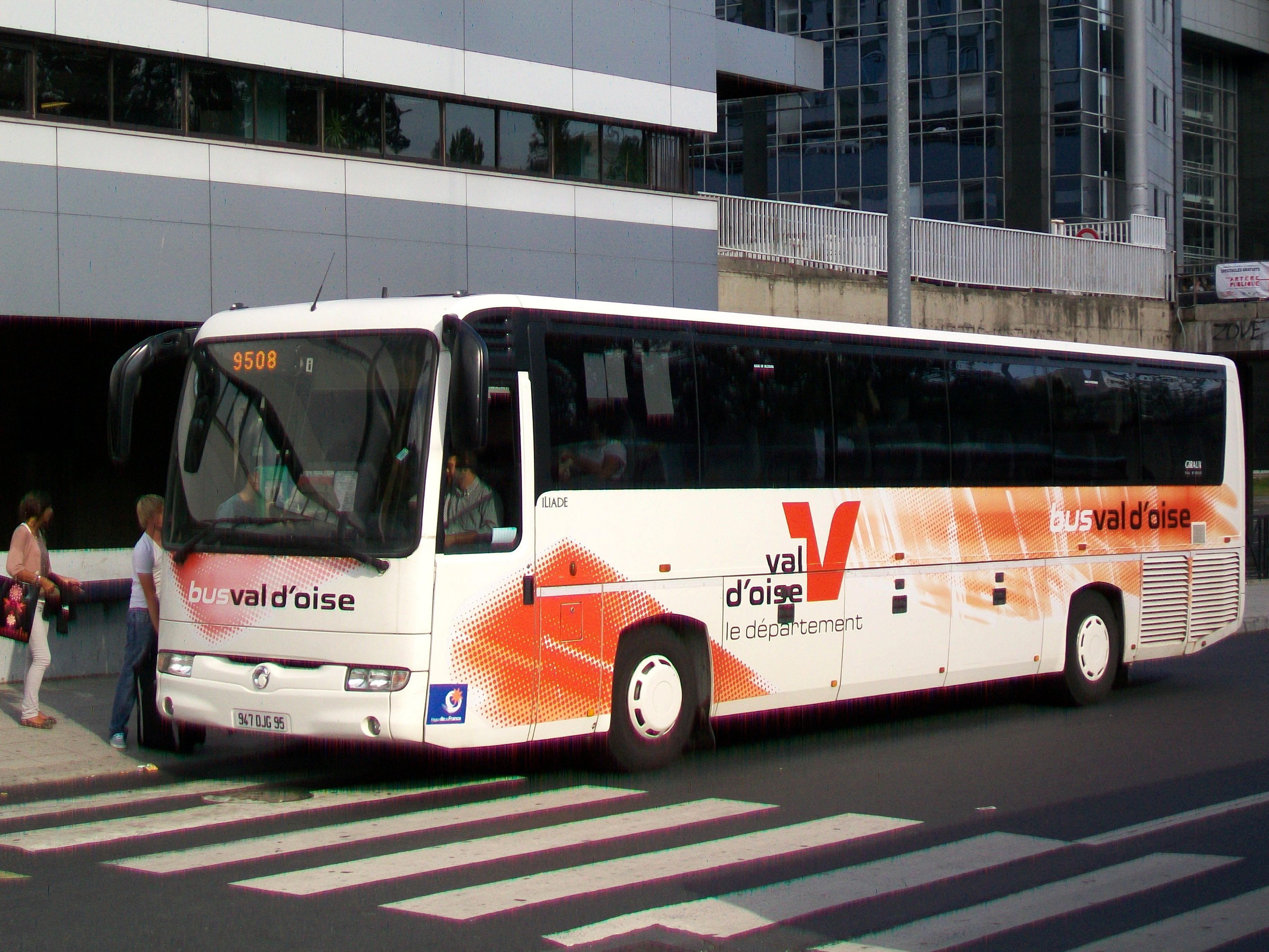 Car Irisbus Iliade de la société CEOBUS (95-Genicourt), sur la ligne départementale 95-08 Cergy - Chars, à la gare routière de Cergy-Préfecture RER.